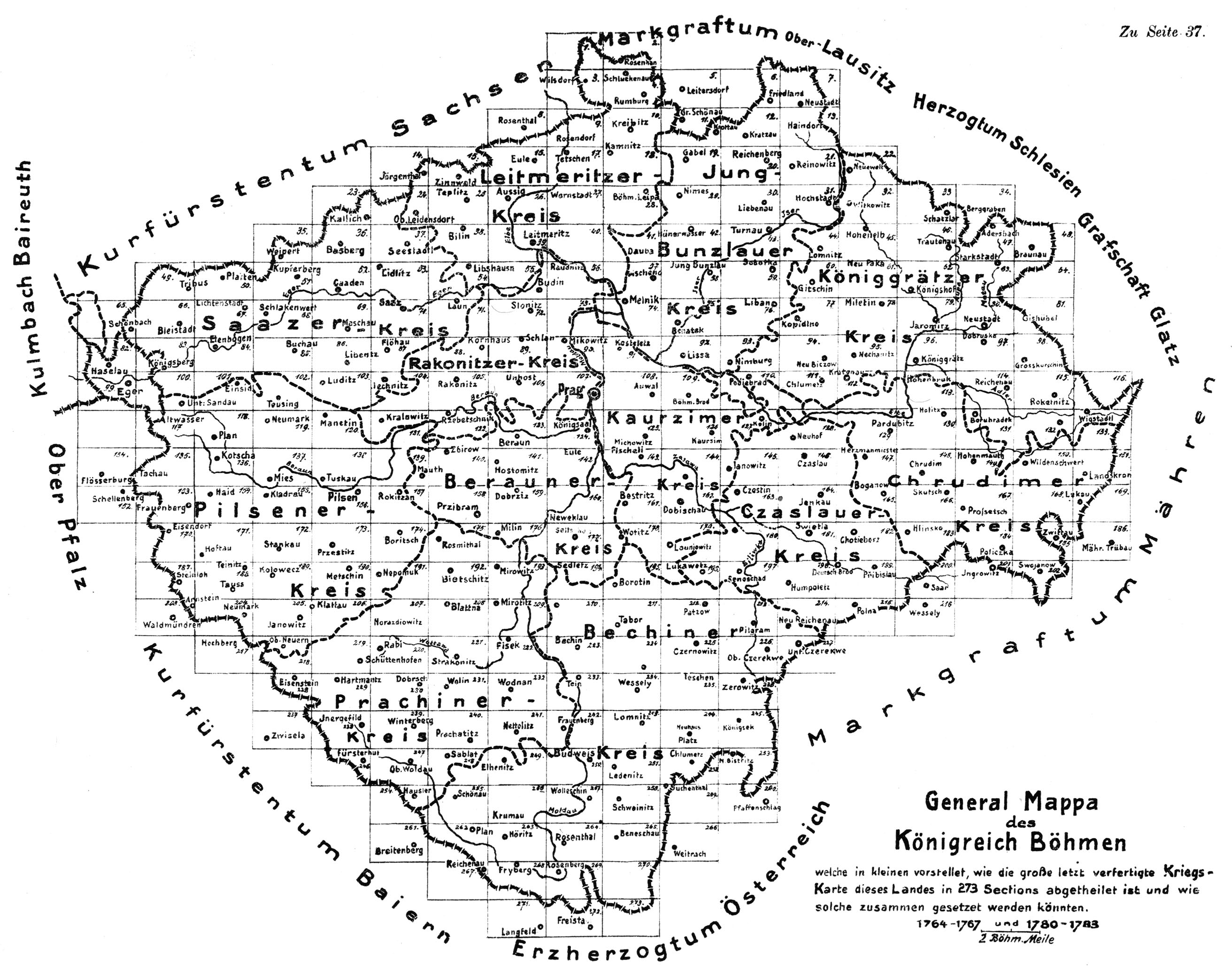 Harta generală a Boemiei în hărţile iozefine, executată între anii 1764-67 şi 1780-83.